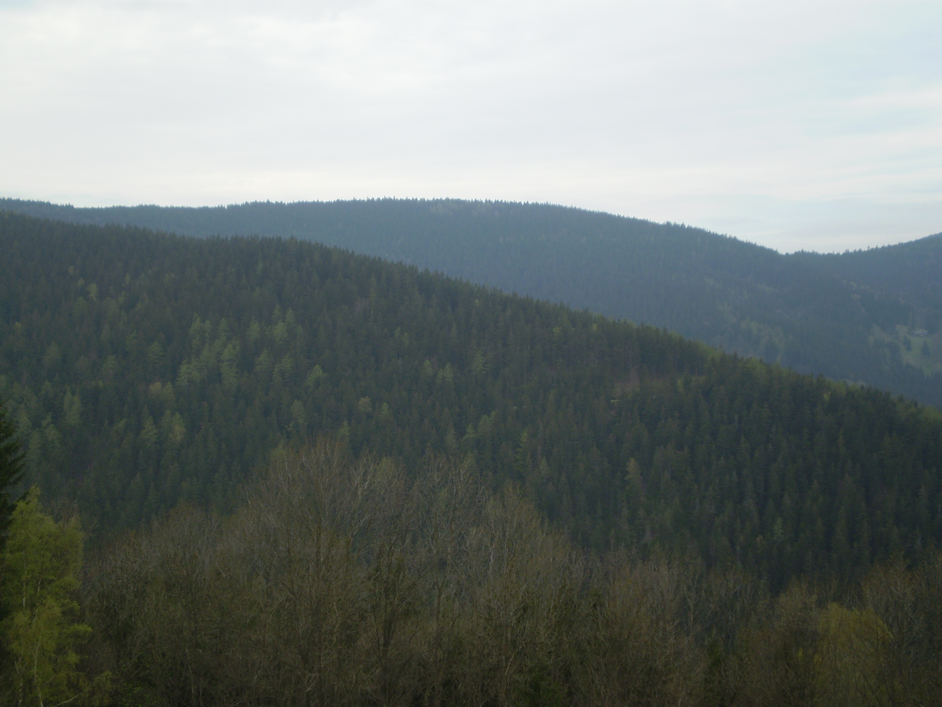 Jánský vrch, Krkonoše